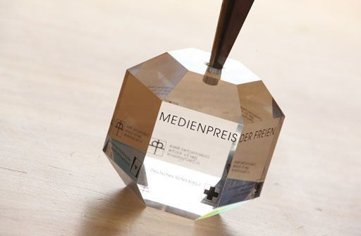 Pokal (Detail) des Medienpreises für Sozialfotografie der Bundesarbeitsgemeinschaft der Freien Wohlfahrtspflege (BAGFW) für die Fotodokumentation Kindheit im Asyl, in: Süddeutsche Zeitung Magazin (1994) von Andreas Bohnenstengel, Fotograf